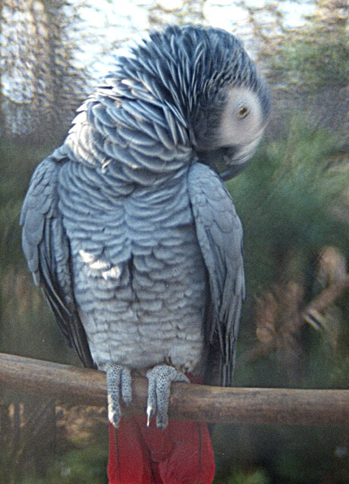 Graupapagei (Psittacus erithacus) - "Graupapageien aus unserem Tierpark in Hbs"